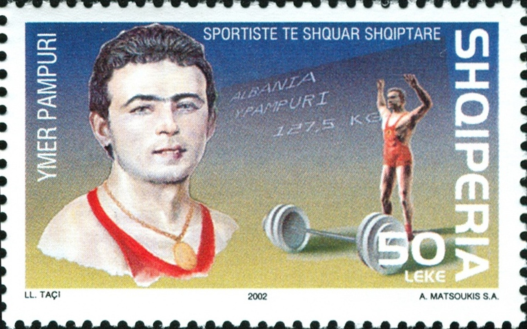 Albanian stamp showing Ymer Pempuri